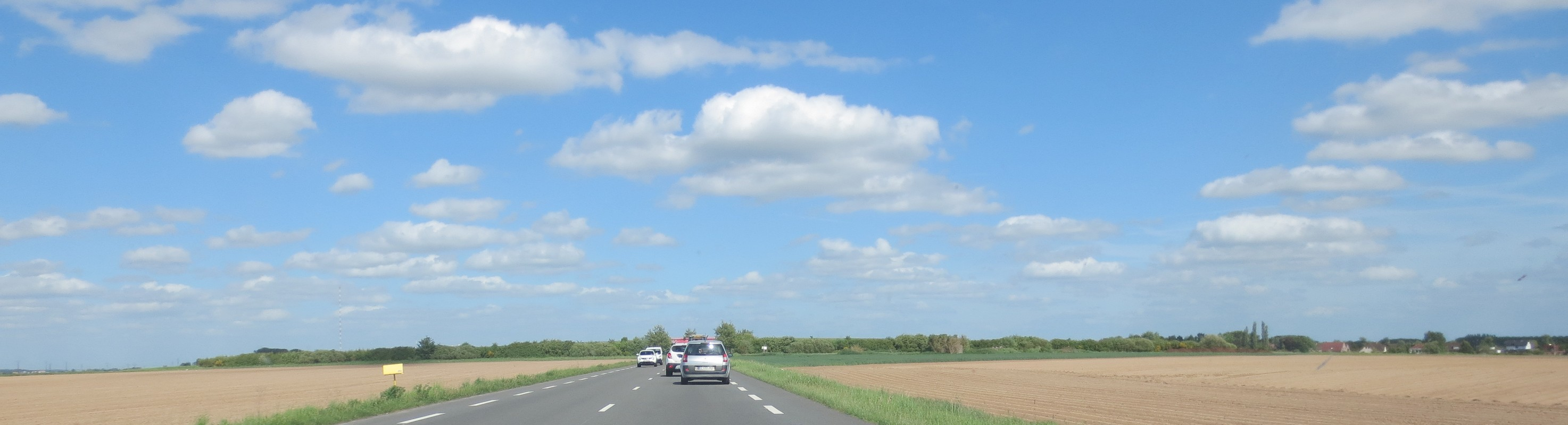 Vue panoramique de Carvin